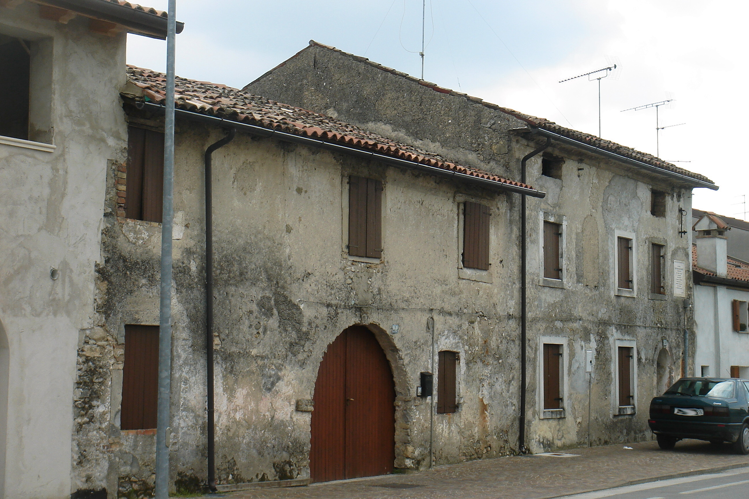 San Fior (Treviso, Italia): Borgo Barozzi con la casa natale di Sebastiano Barozzi, con lapide commemorativa in facciata.